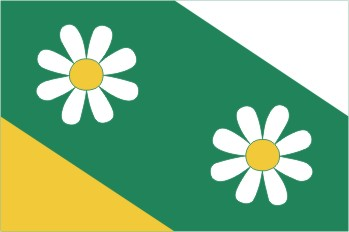 Heřmanov (okres Žďár nad Sázavou)